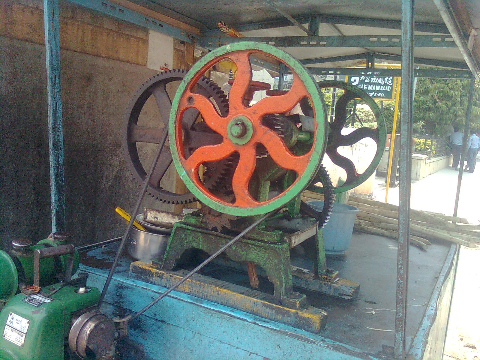 കരിമ്പ് പിഴിയുന്ന യന്ത്രം